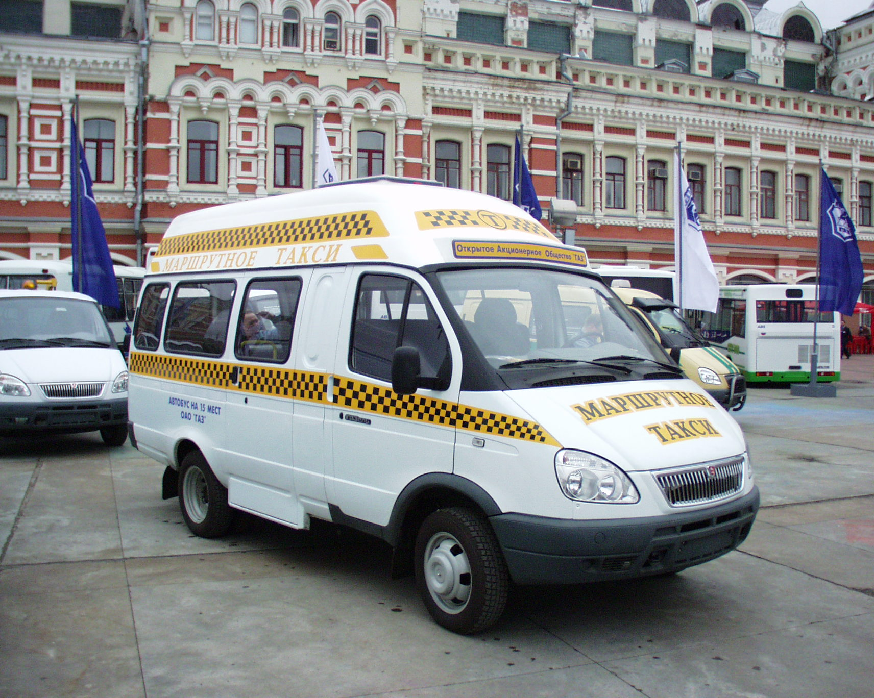 ГАЗель-маршрутка с высокой крышей ГАЗ-322133